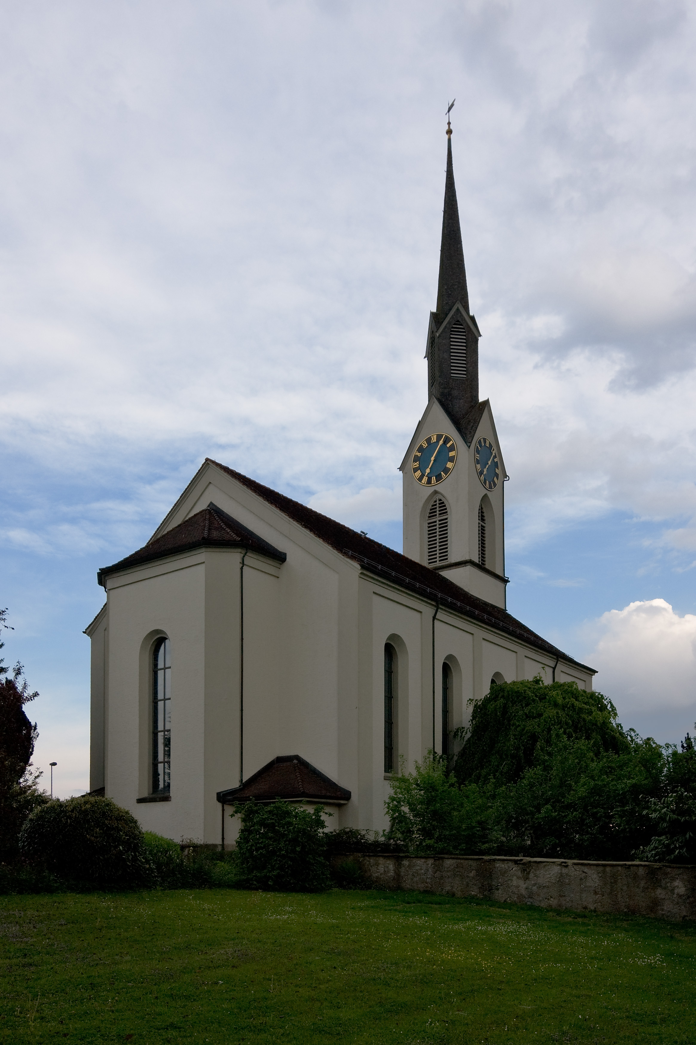 Die Kirche in Obfelden vom Friedhof gesehenArchitekt Ferdinand Stadler